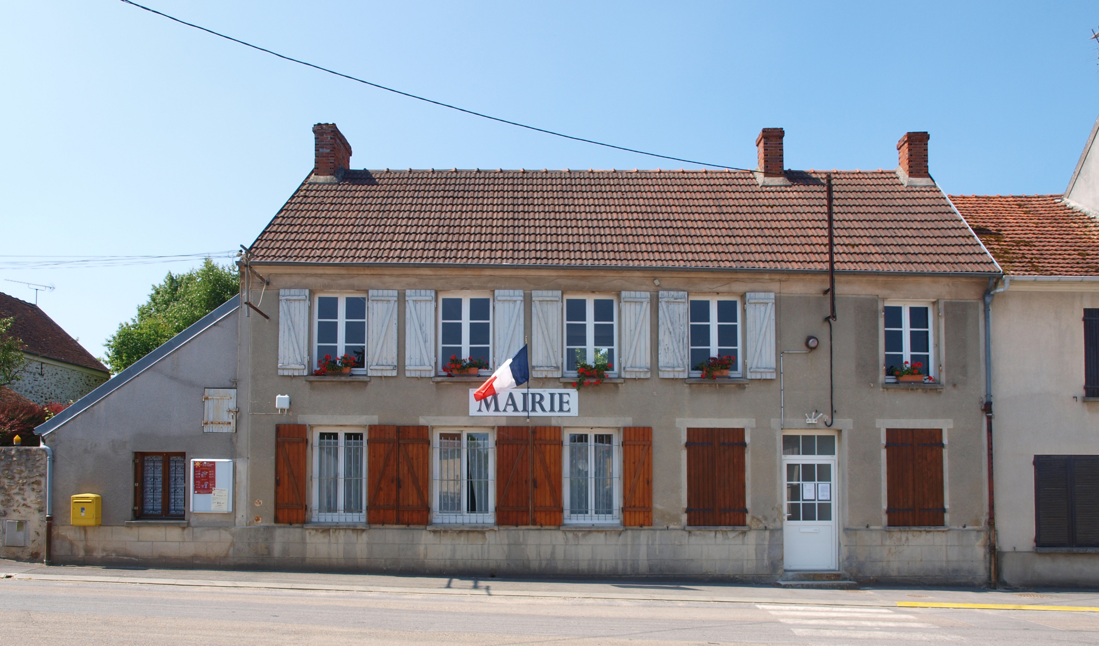 Bézu-Saint-Germain (Aisne, France)